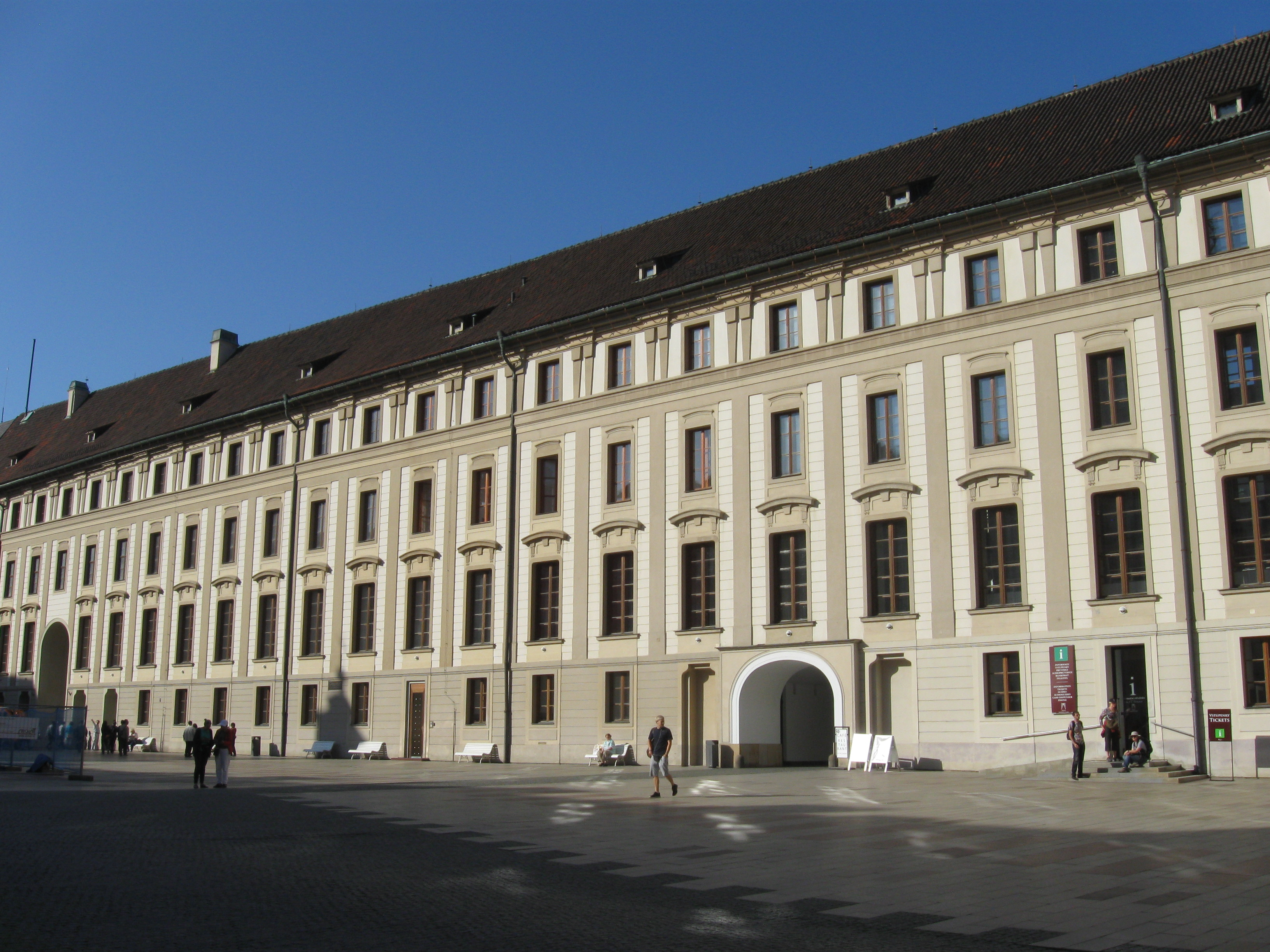 Pražský hrad, Praha 1-Hradčany